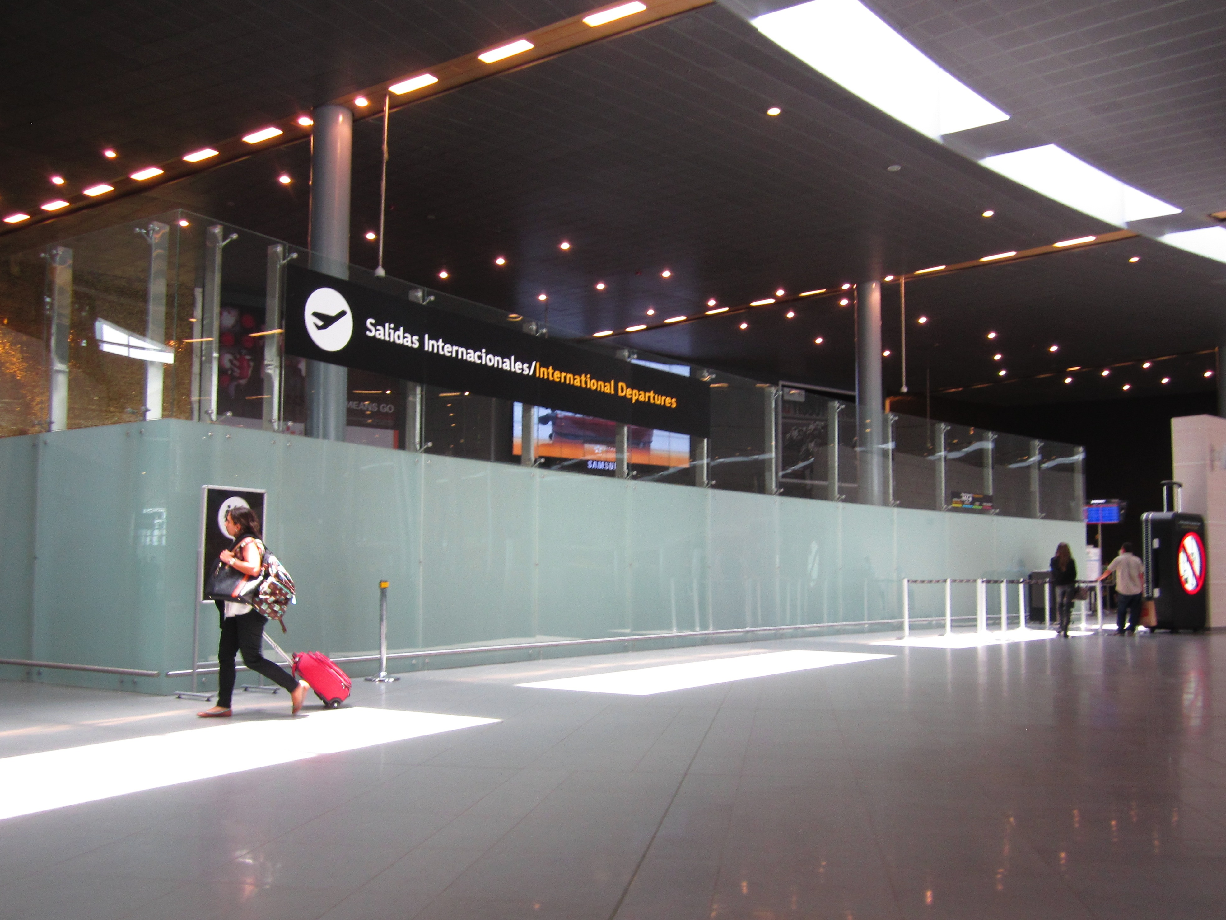 Nuevo Aeropuerto Eldorado de Bogotá. Salidas internacionales.